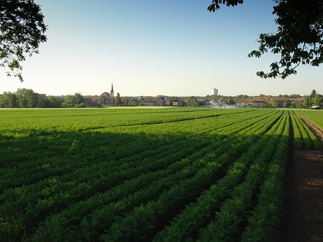 Hatzenbühl, von Norden gesehen